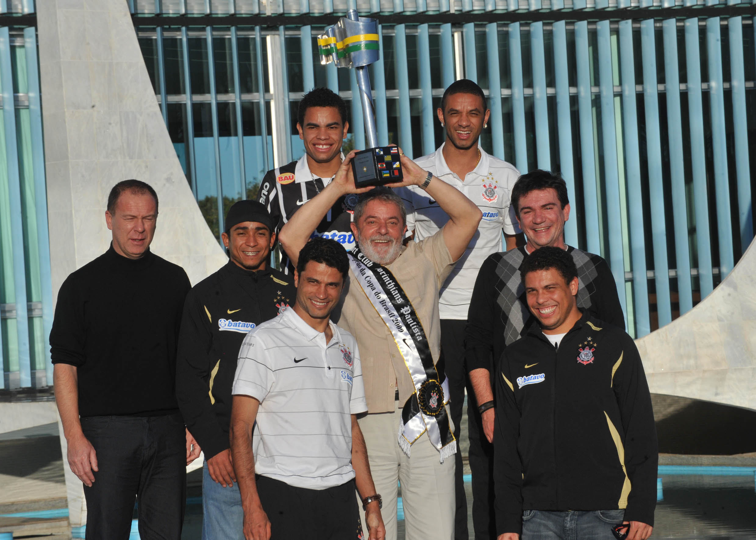 O presidente Lula recebe os jogadores do Corinthians, a delegação foi recebida após conquistar o título da Copa do Brasil, na quarta-feira, em Porto Alegre, com empate por 2 a 2 diante do Internacional